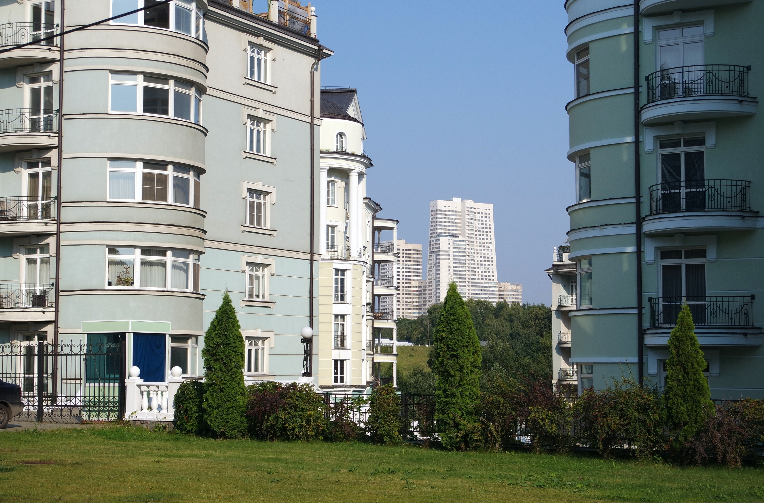 Жилой комплекс «Покровский берег», вдали — жилой комплекс «Северный парк»